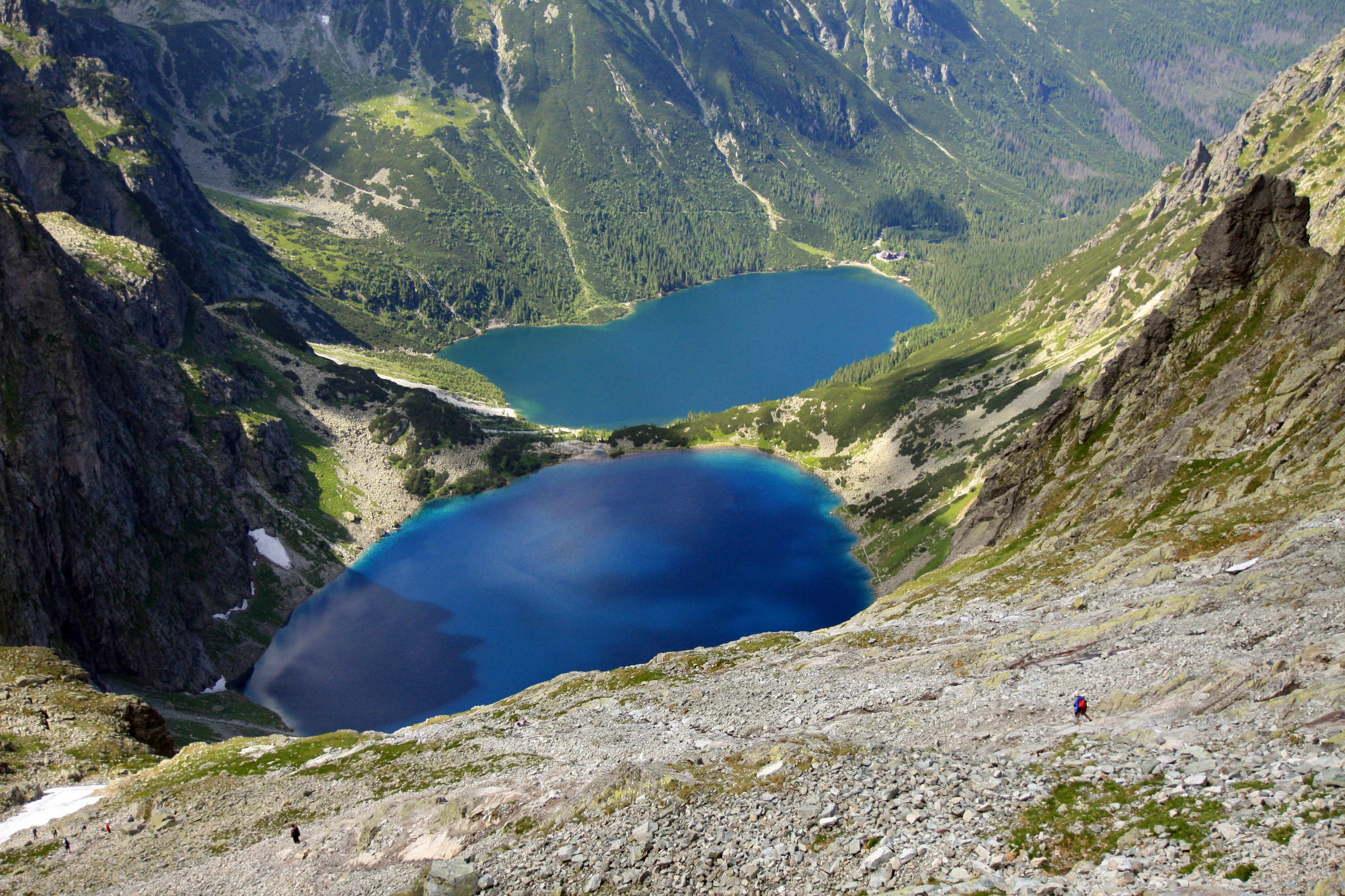 Czarny Staw pod Rysami. Fot. Tomasz Hens